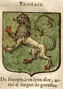 Tristain. Hierome de Bara